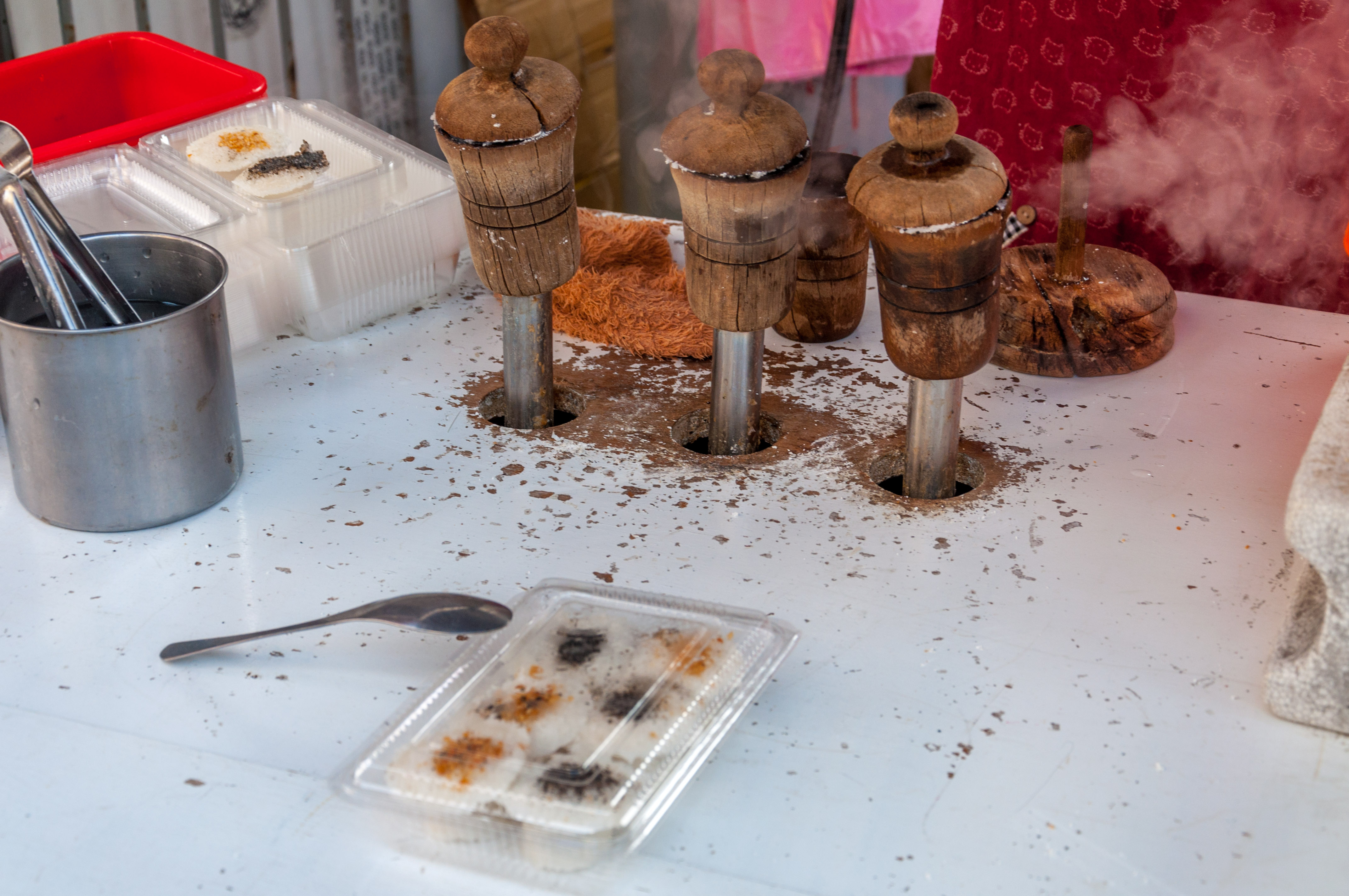 臺灣狀元糕，攝於臺南鹽水